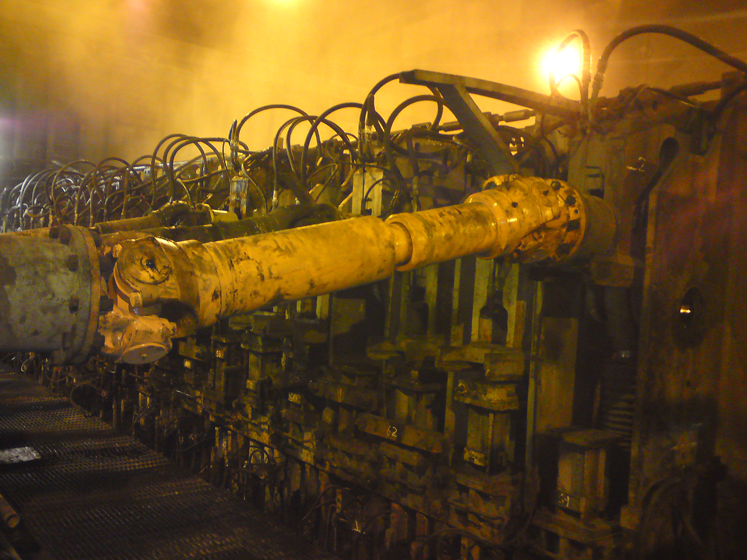 eixo cardan com aplicação